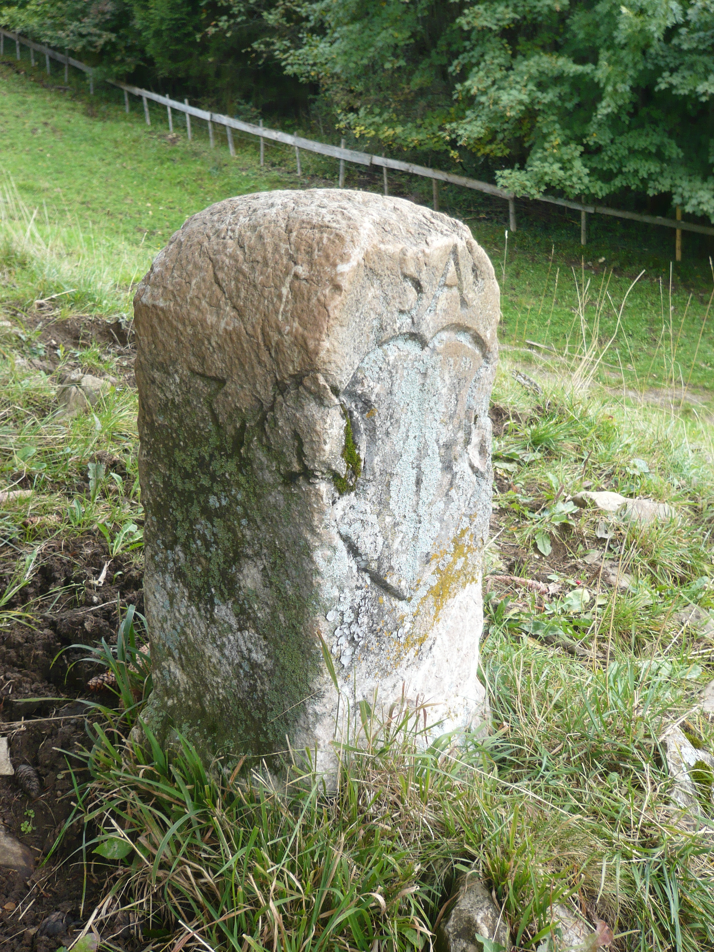 Burg Hohenfreyberg, Malefizstein Nr. 3, Detail 2